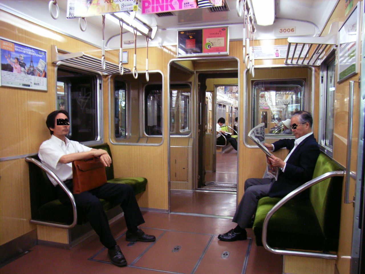 西宮北口駅停車中の3000系の車内。